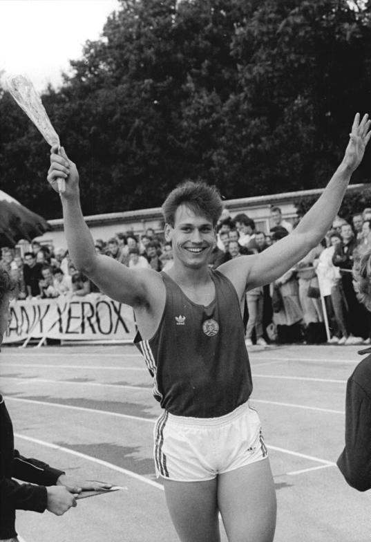 Sven Matthes ADN-ZB Oberst 13.9.88 Berlin: Leichtathletik-Meeting zur Verabschiedung der Olympiastarter- Sven Matthes (SC Dynamo Berlin) erzielte bei seinem Sieg über 100 m mit 10,14 s einen neuen Junioren-Europarekord. Er blieb vier Hundertstelsekunden unter seiner bisherigen europäischen Bestmarke von 10,18 s.